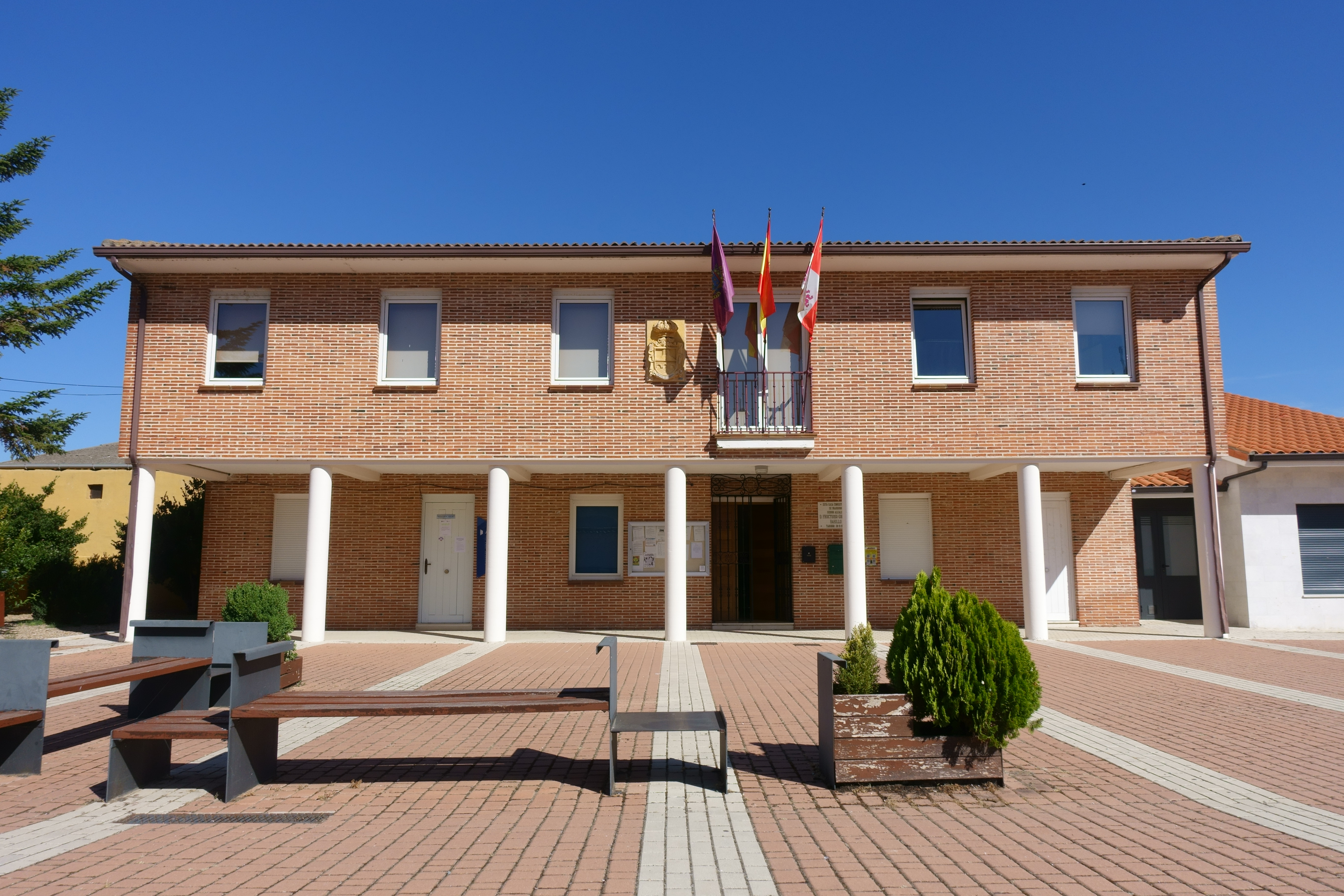 Casa consistorial de Tariego de Cerrato (Palencia, España).